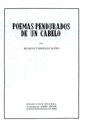 Poemas pendurados de un cabelo por Ricardo Carballo Calero, Colección Xistral, 1952